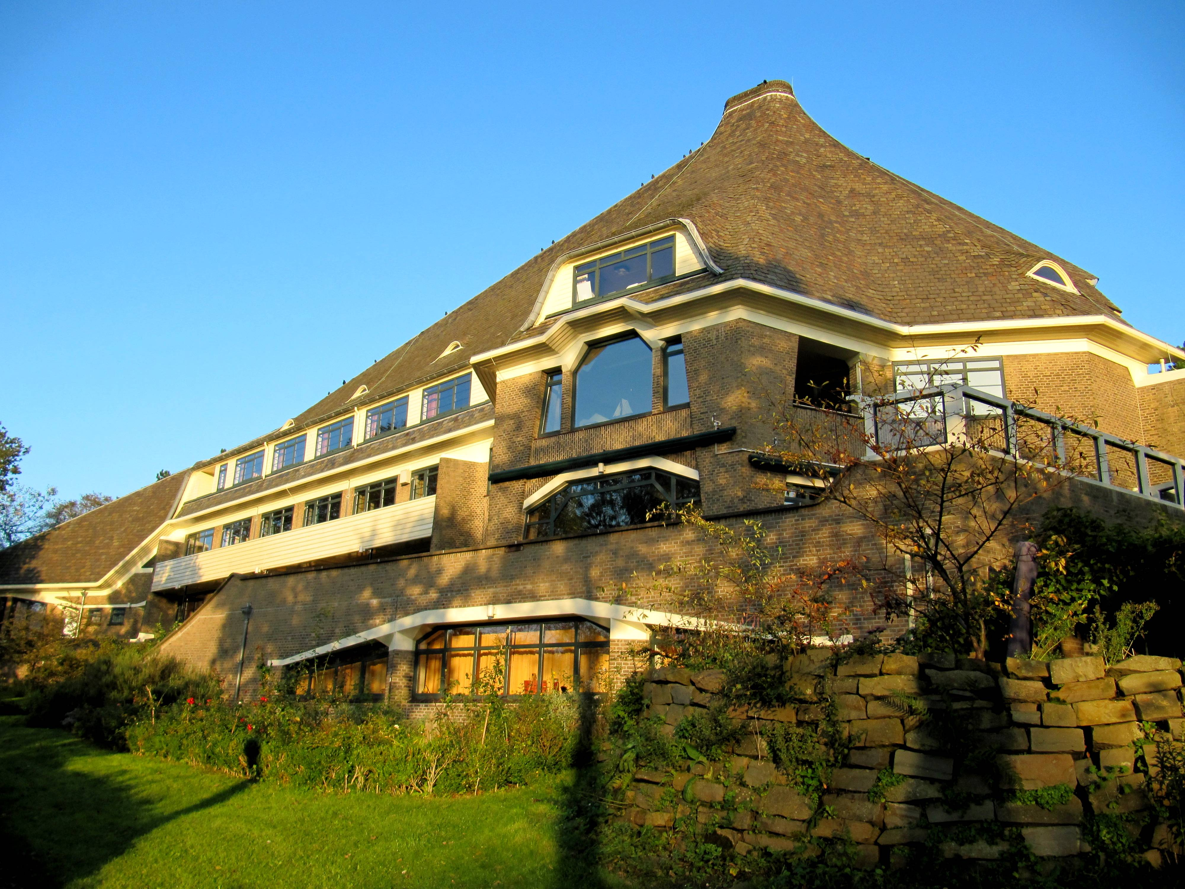 Nieuwe Parklaan 58 Rudolf Steiner Kliniek - ziekenhuis ter hoogte van drie bouwlagen onder hoogopgaande a-symmetrische kap, gedekt met roestkleurige daktegels, totstandgekomen in 1924-'27 naar ontwerp van J.W.E. Buijs en J.B. Lursen, in een volgens opdracht - van de Antroposofische Vereniging Nederland - door de antroposofie ingegeven bouwtrant.